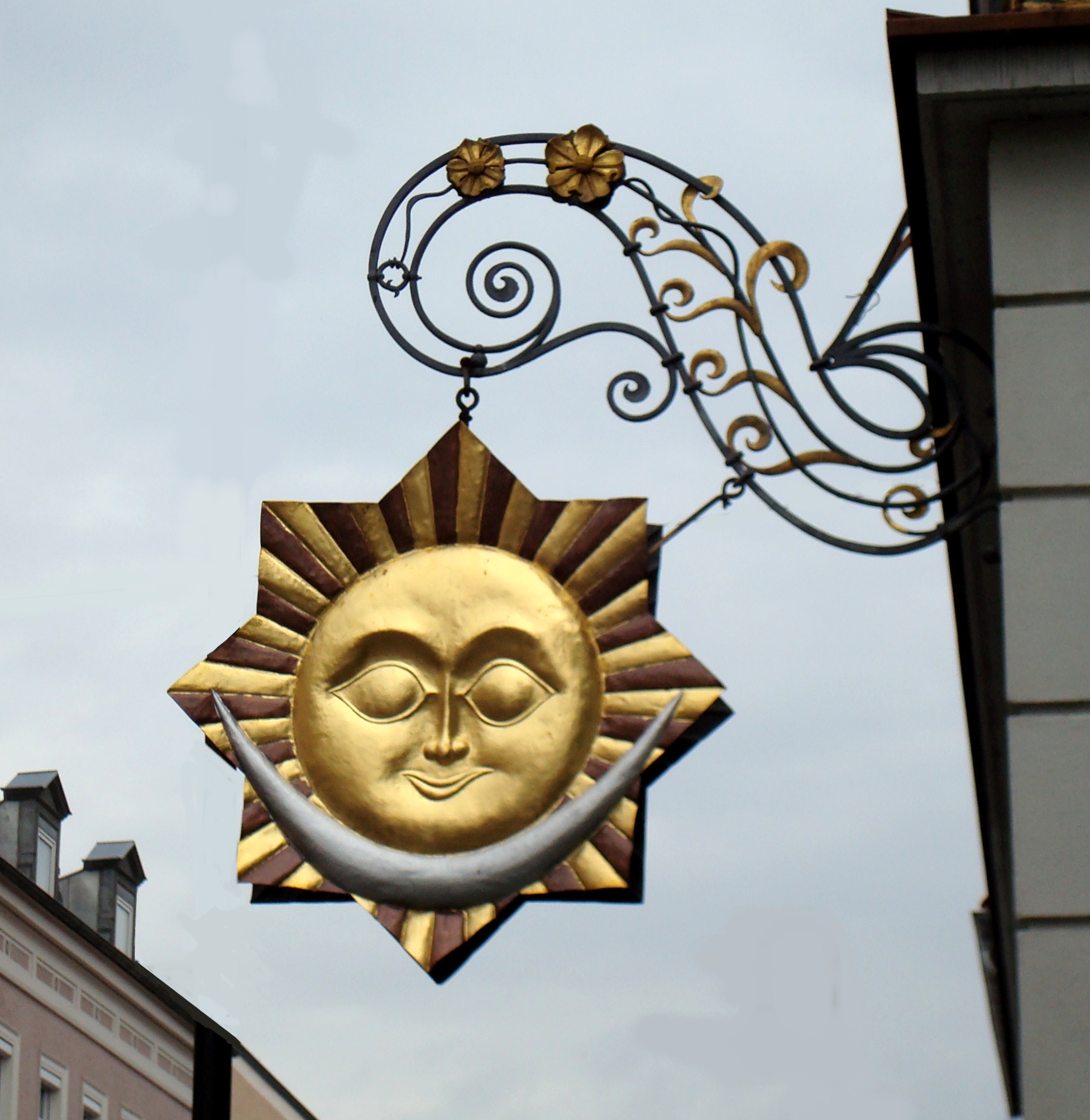 Simbach am Inn, Innstraße 7, Metallbildhauerarbeit von Prof. Alfred Habermann nach einem Motiv an der Flügeltür eines nepalesischen Tempels.